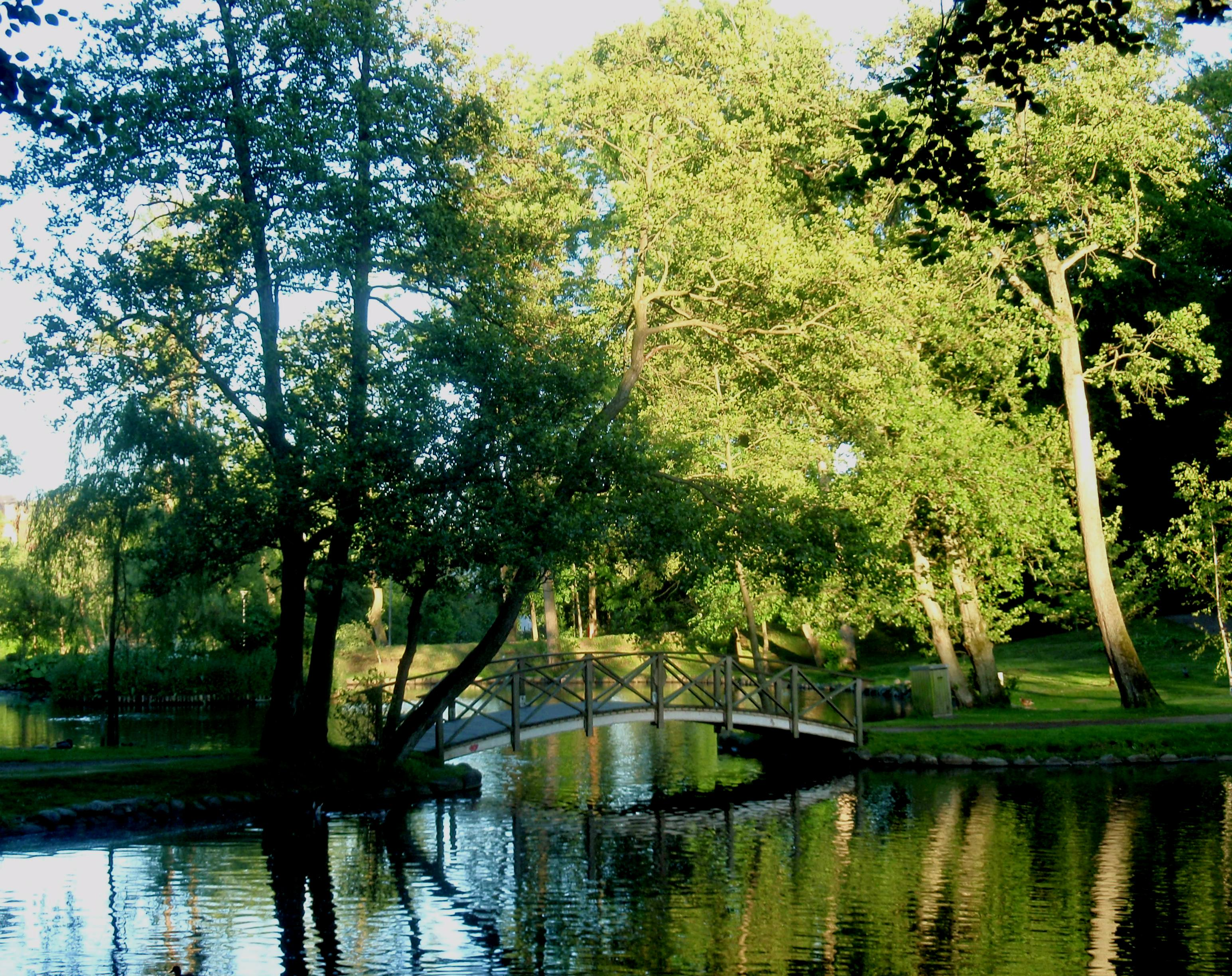 Svanelunden